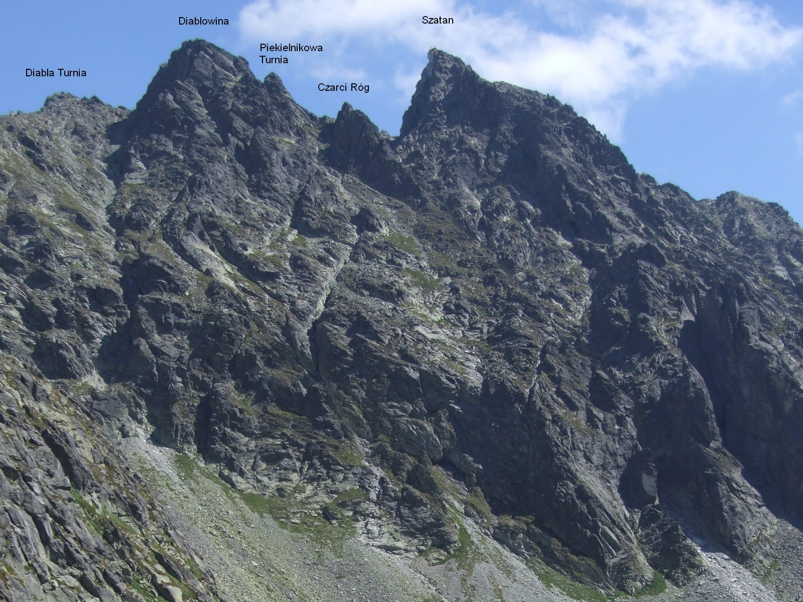 Diablowina, Piekielnikowa Turnia, Szatan (Tatra Mountains)